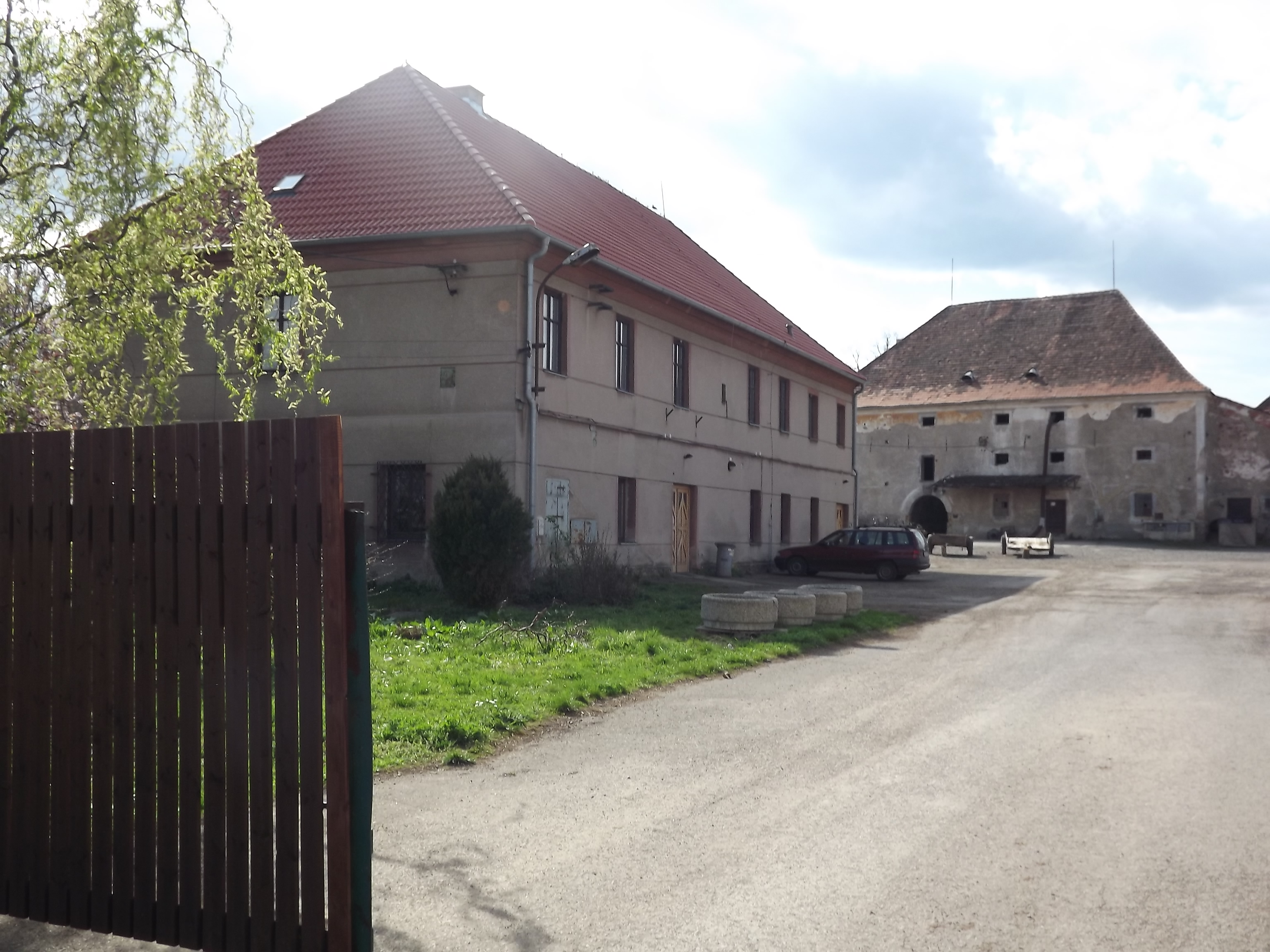 Fara, Pičín 10, Pičín.